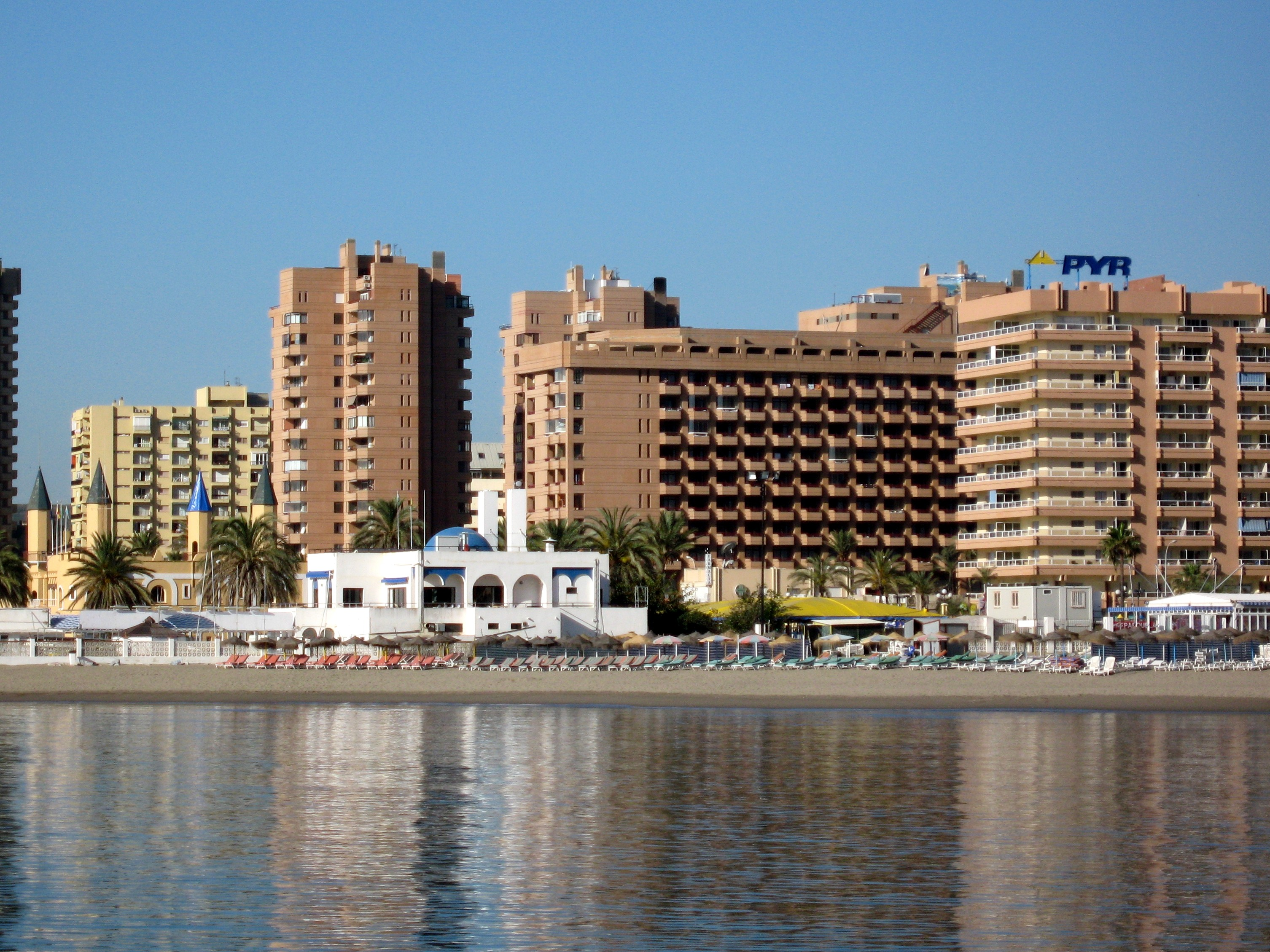 Strand von San Francisco / Playa de San Francisco, Fuengirola, Provinz Málaga, Andalusien, Spanien